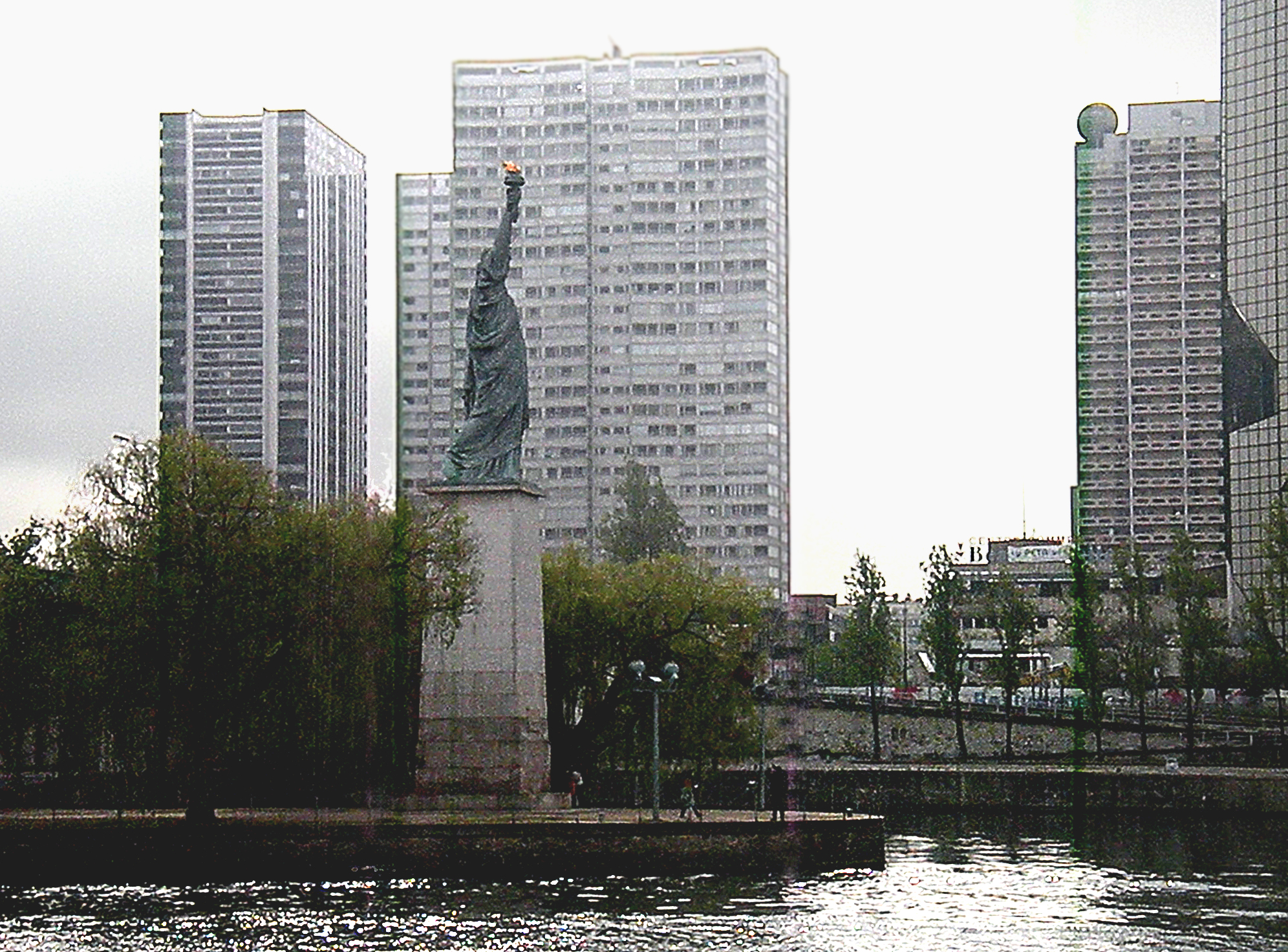 Бартольди.Статуя Свободы.Париж